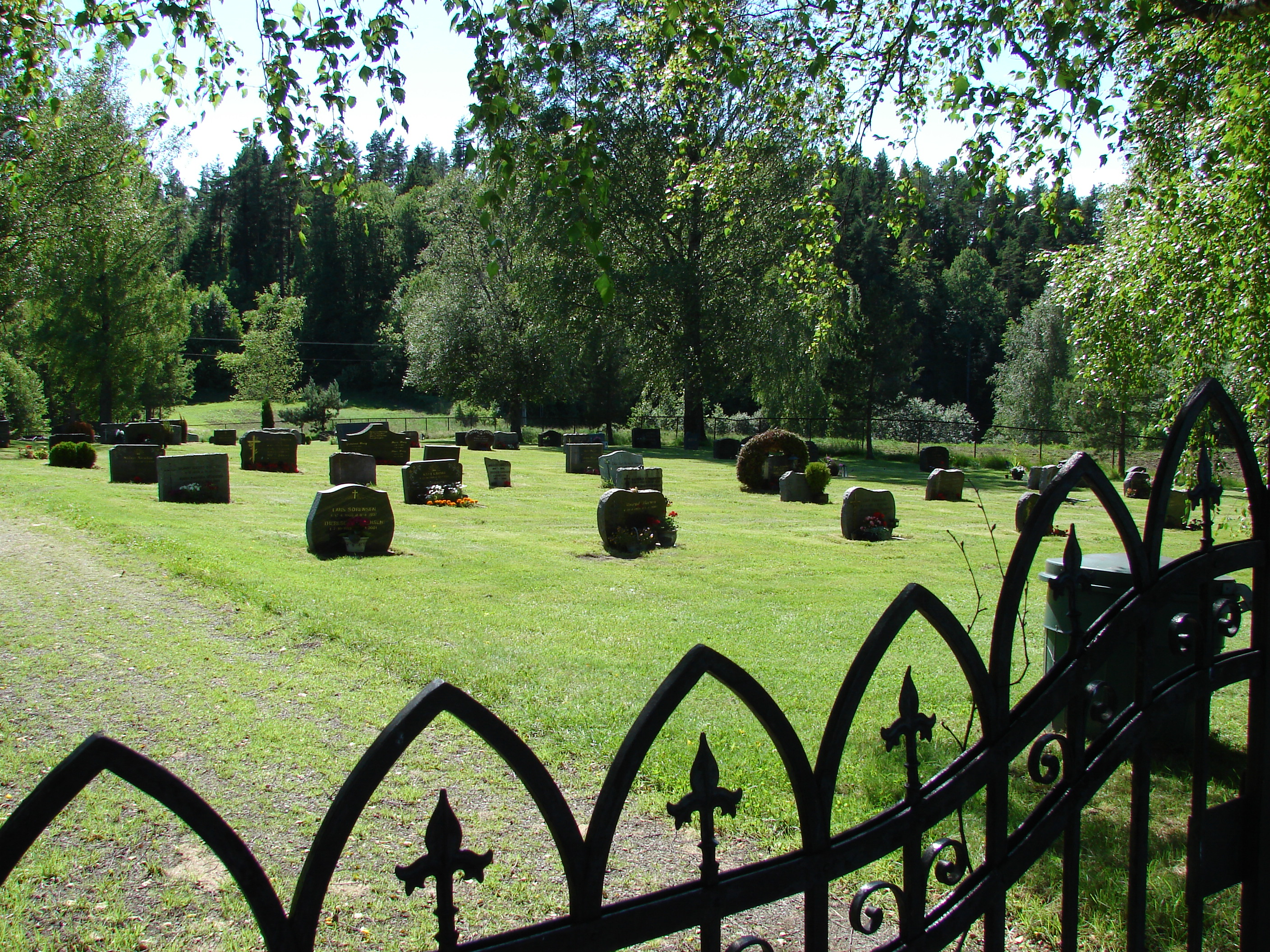 Omdal Kirkegård i Telemarken